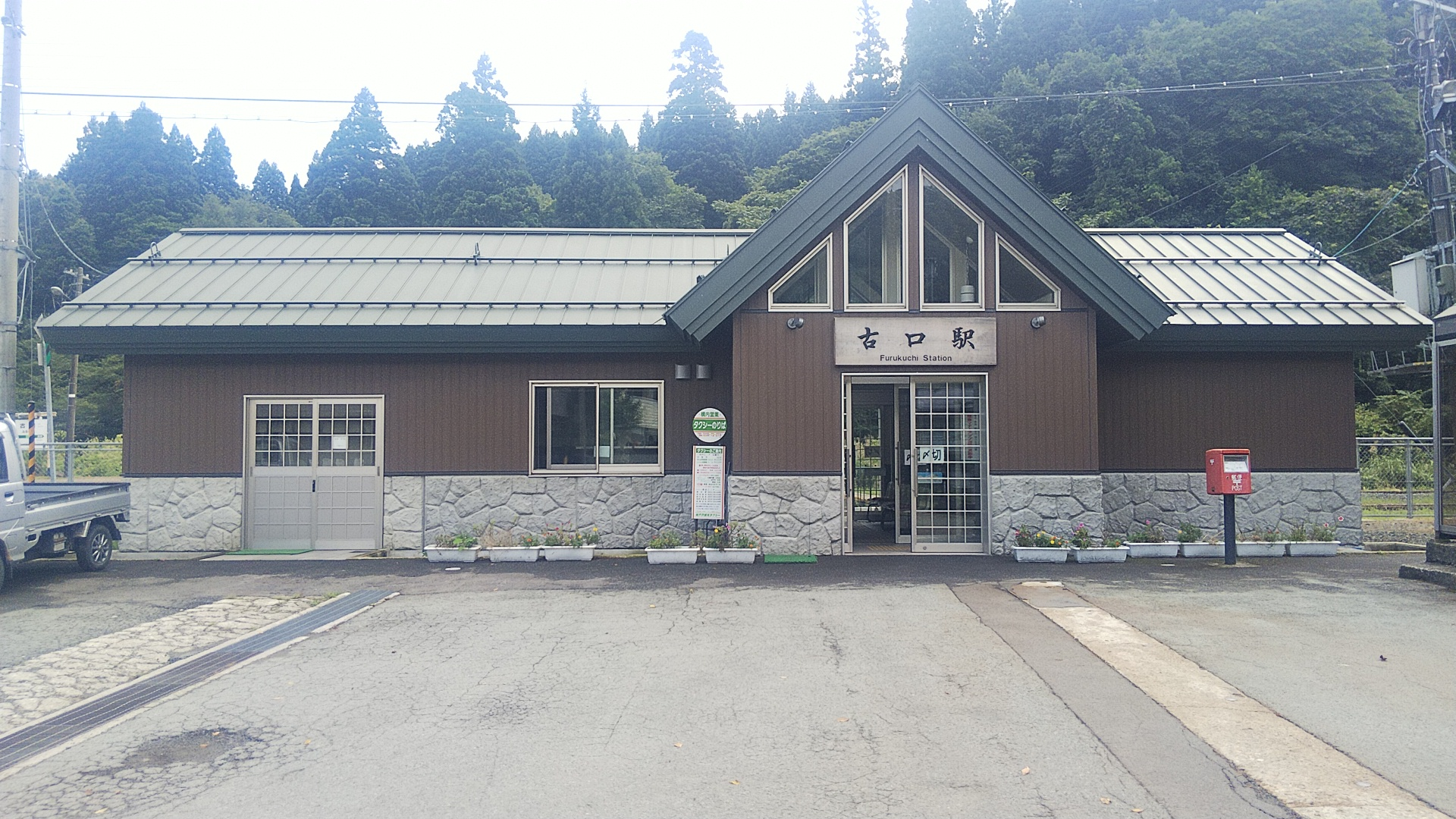 古口駅駅舎